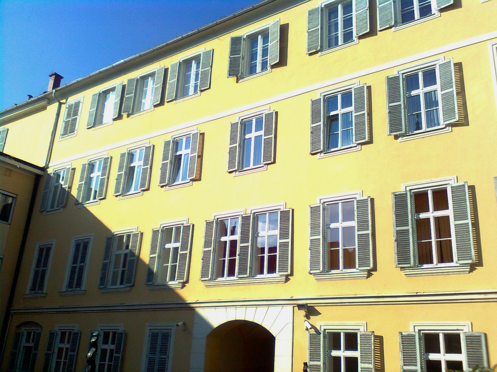 Bischöfliches Palais in Graz, Rückseite